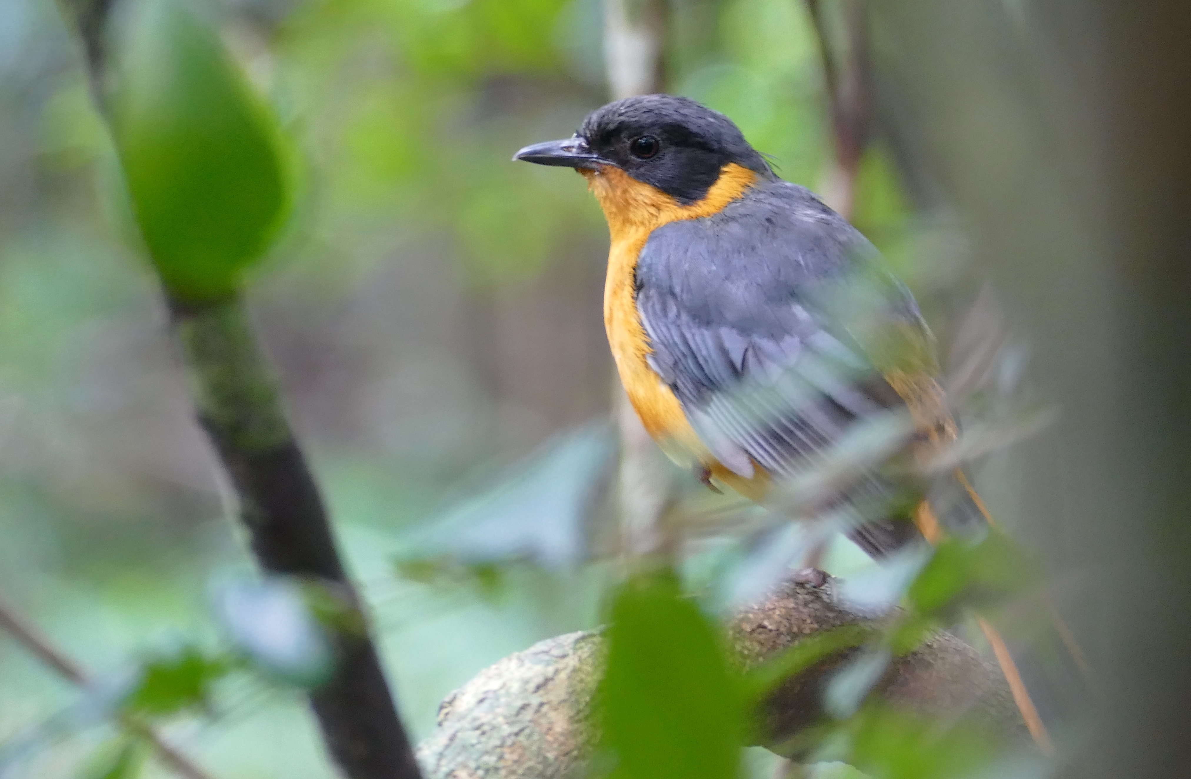 Dlinza Forest, Eshowe, KwaZulu-Natal, SOUTH AFRICA